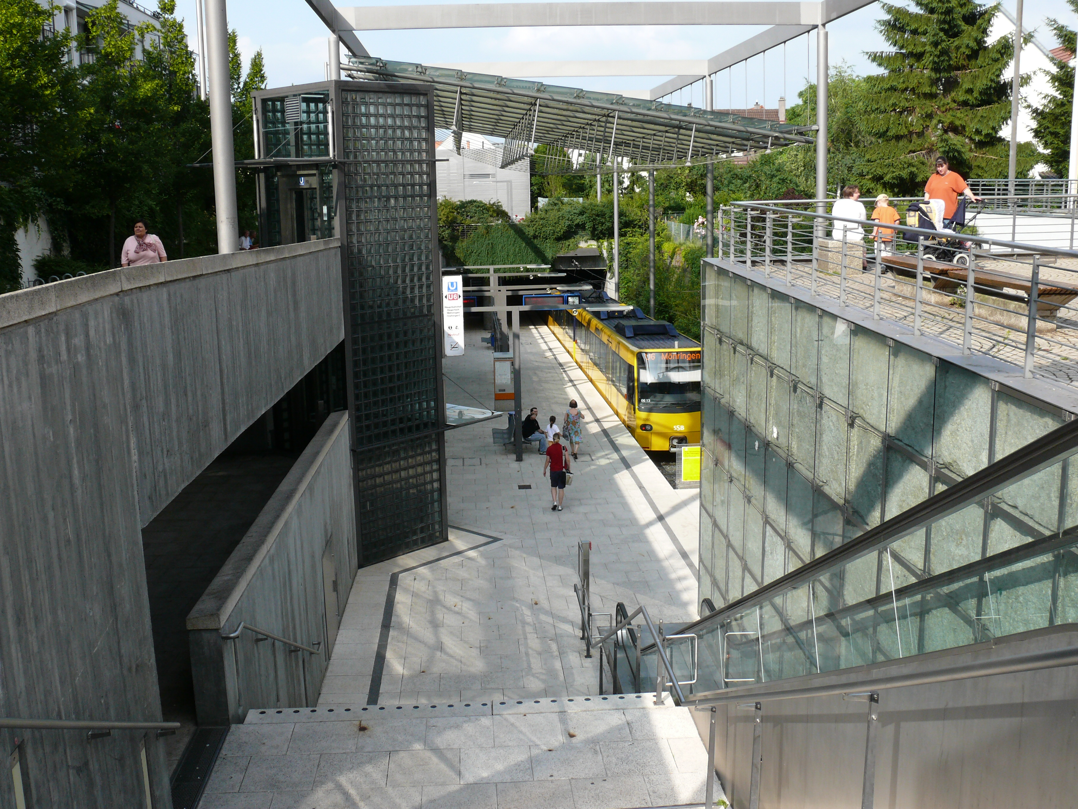 Die Stadtbahnhaltestelle Gerlingen in Gerlingen.